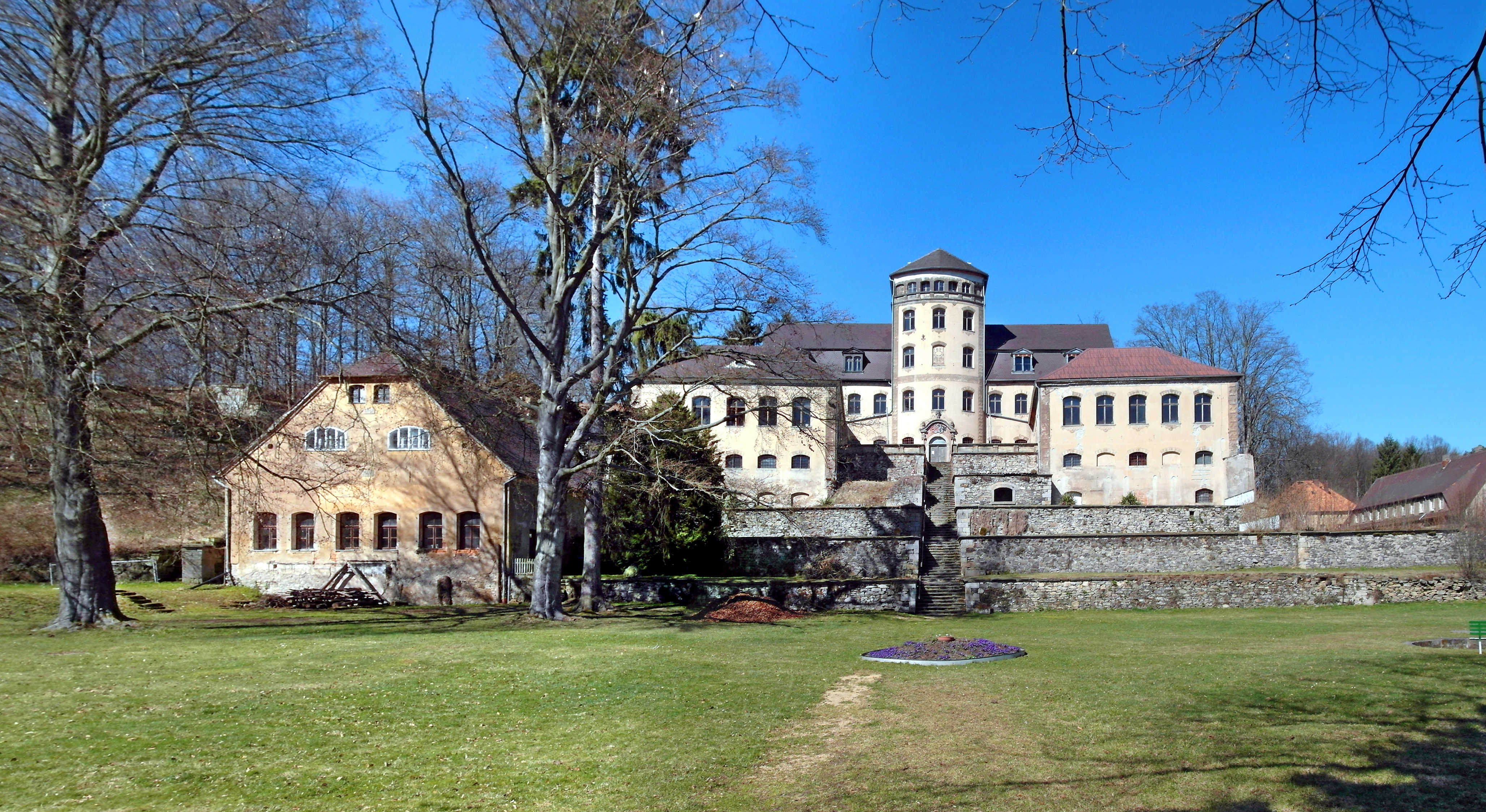 27.03.2017 02779 Hainewalde (Großschönau) Weinberg 2 / Ecke Kleine Seite: Neues Schloß (GMP: 50.915163,14.707775), für Samuel Friedrich von Canitz {Kanitz}1749 - 1755 erbaut, 1882/83 umgebaut. Das teilweise auf aufgeschüttetem Gelände errichtet Haus senkte sich bedenklich und darum ließ der Schloßherr von Kanitz eine Brauerei als Stütze anbauen. Die Nazis nutzen das Ensemble 1933 als Schutzhaftlager, später als Wehrertüchtigungslager. Der Ende der DDR-Zeit 1988/89 geplante Umbau zum FDGB-Ferienhotel konnte nicht mehr verwirklicht werden. Das leerstehende Gebäude verfällt. Sicht von Südosten. [SAM8963-8964.JPG]20170327160MDR.JPG(c)Blobelt